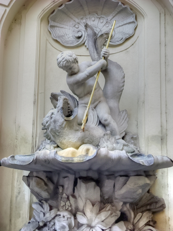 Wandzierbrunnen Knabe mit Delfin an der Alten Universitätsaula, Wien, Innere Stadt